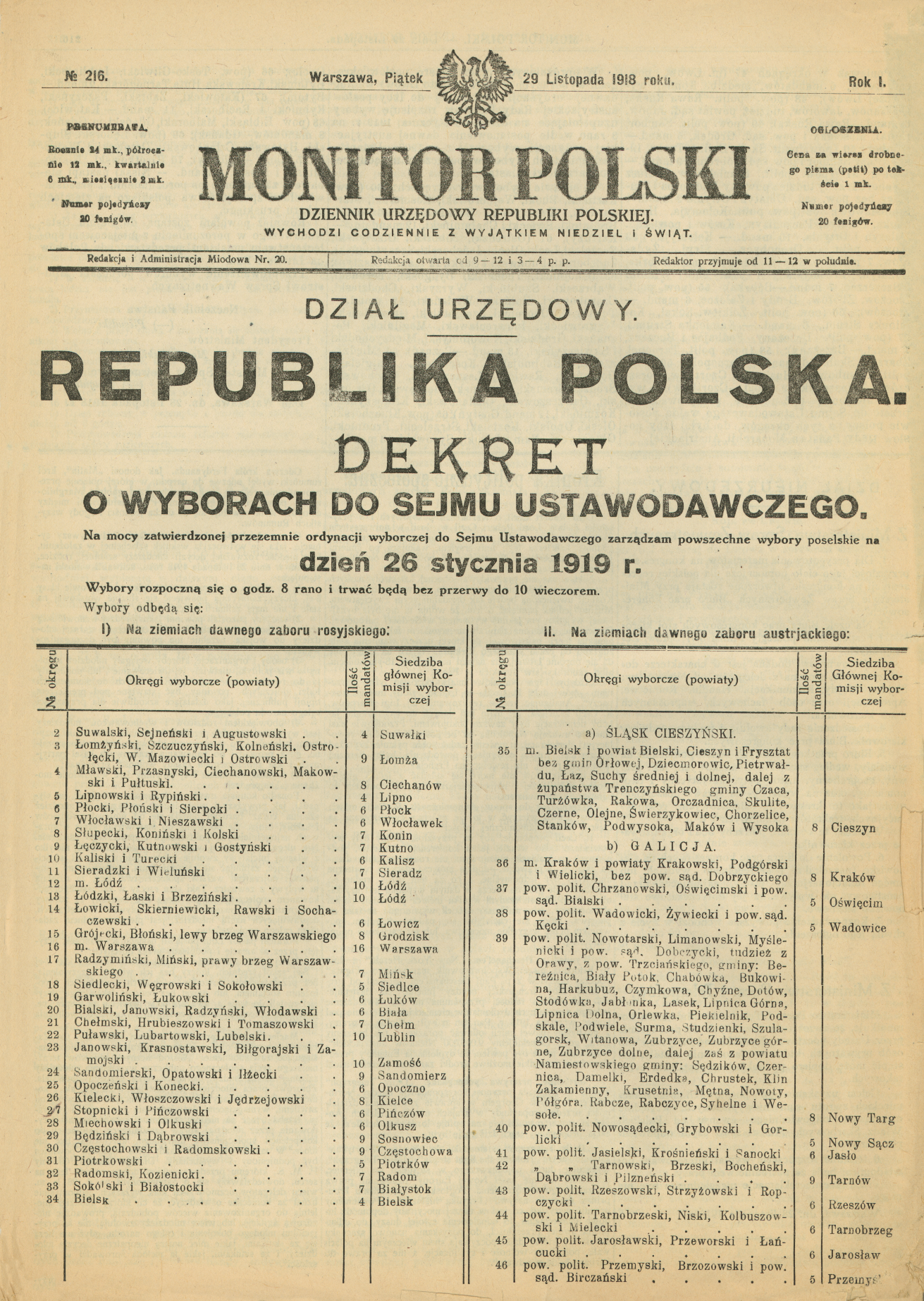 Dekret o wyborach do Sejmu Ustawodawczego opublikowany w Monitorze Polskim